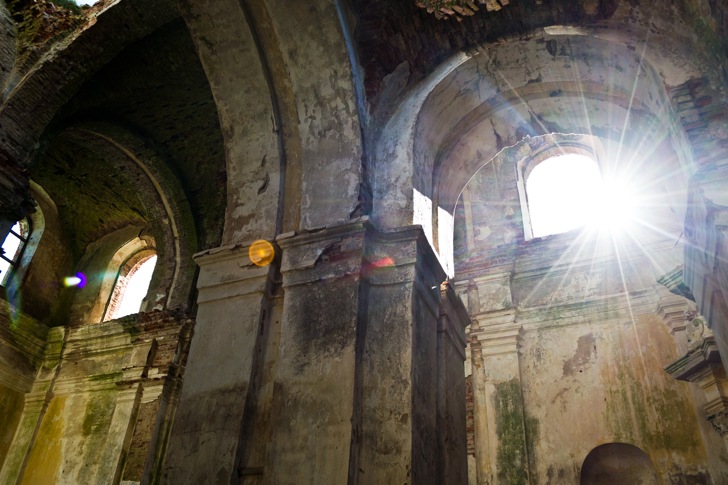 Беларуская (тарашкевіца): Былы кляштар бэрнардынаў:касцёлкляштарны жылы корпус. в. Селішча This is a photo of Belarusian heritage monument. Reference number: 212Г000807 ( WLM)